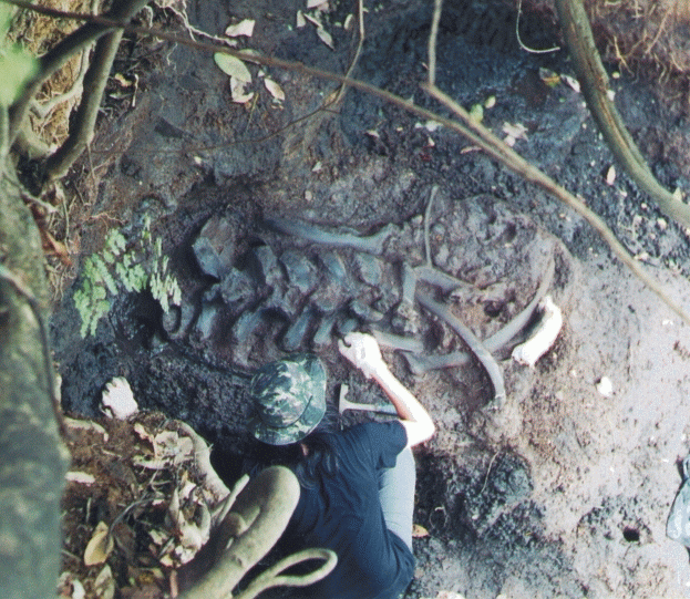 excavación de un megaterio